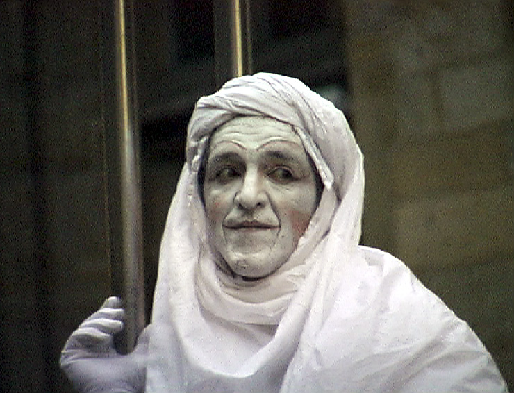 Internationale Kulturtage der Stadt Dortmund 2000, Inko `Nito: „Rêve d’Herbert“ (Straßentheater)